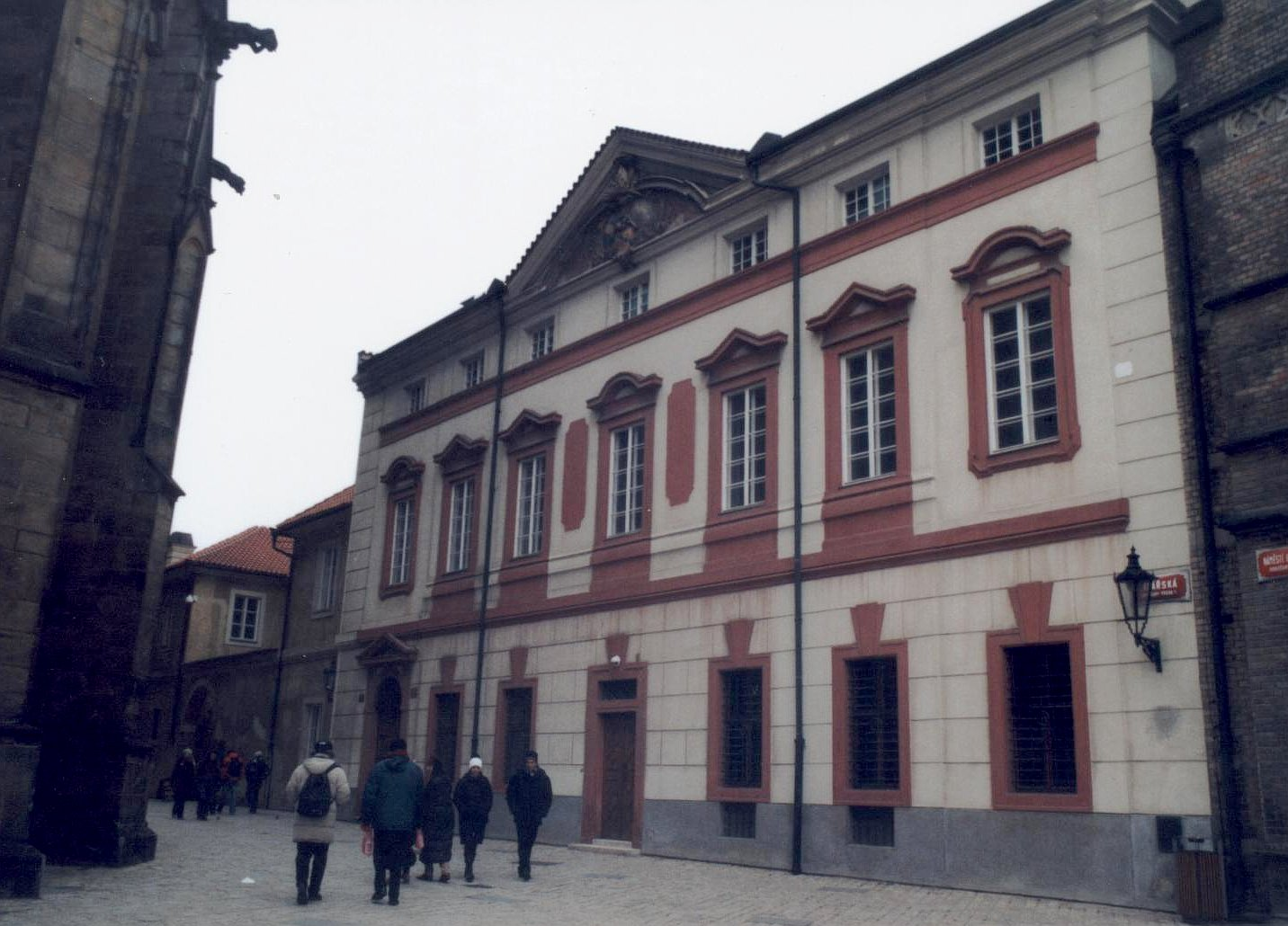 Kapitulní děkanství na Pražském Hradě, architekt Jan Santini 1706